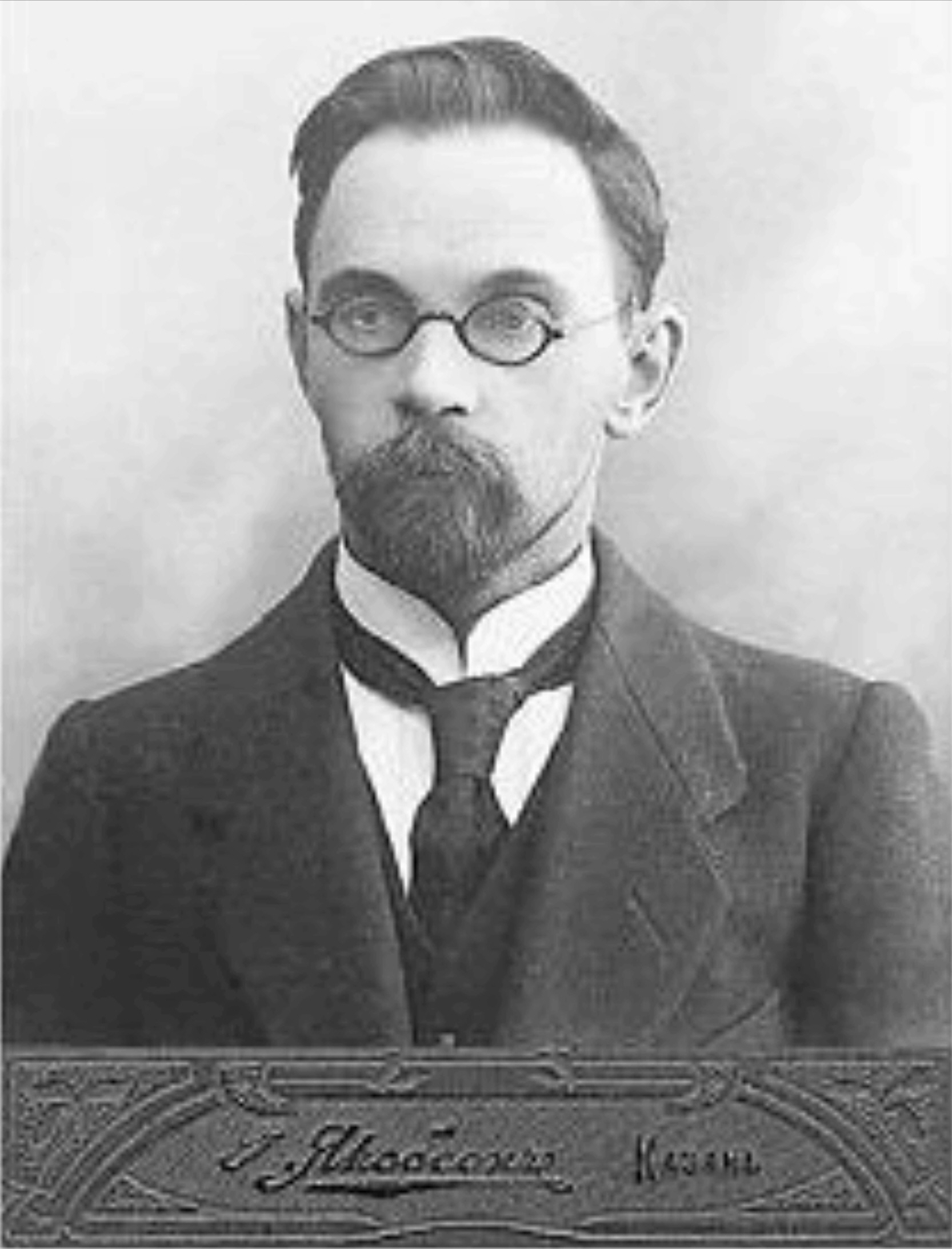 Alexander Jerminingeldowitsch Arbusow (russisch Александр Ерминингельдович Арбузов, wiss. Transliteration Aleksandr Erminingel'dovič Arbuzov; * 30. Augustjul./ 11. September 1877greg. in Arbusow-Baran; † 21. Januar 1968 in Kasan)